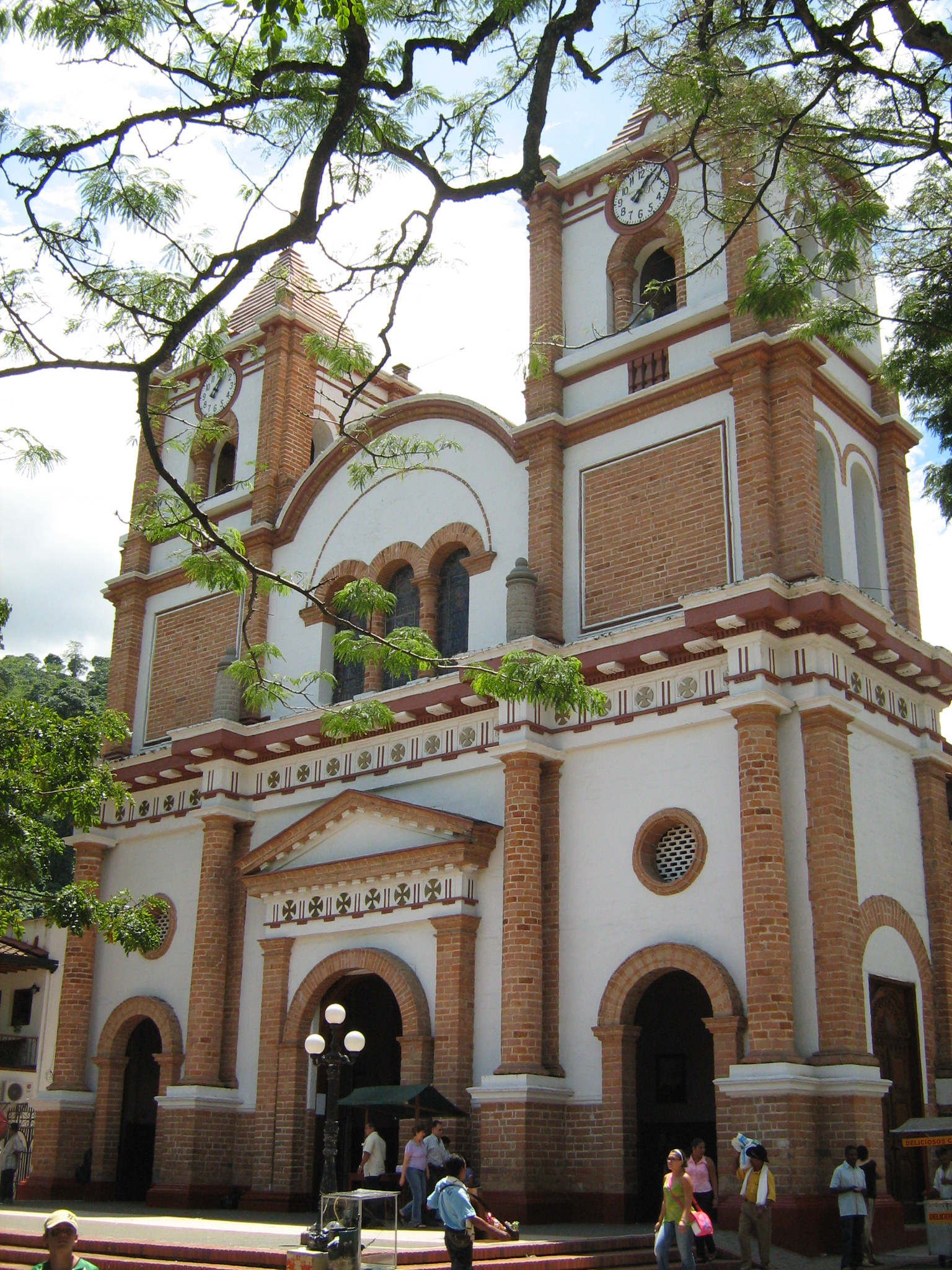 Iglesia de la Inmaculada Concepción, Municipio de ciudad Bolívar, Antioquia. Colombia.